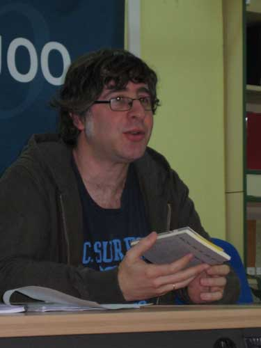 Juan Carlos Gea en 2007